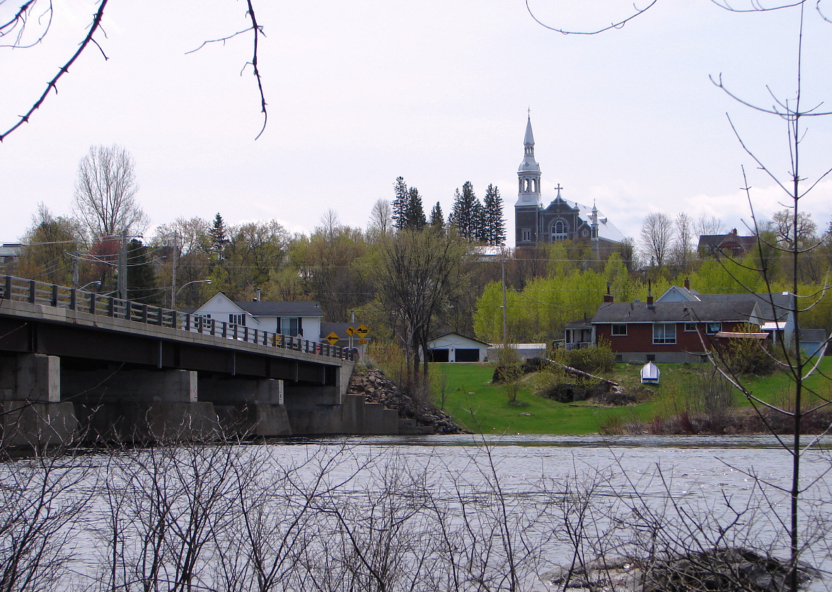 Chapeau, Isle aux Allumettes, Quebec, Canada